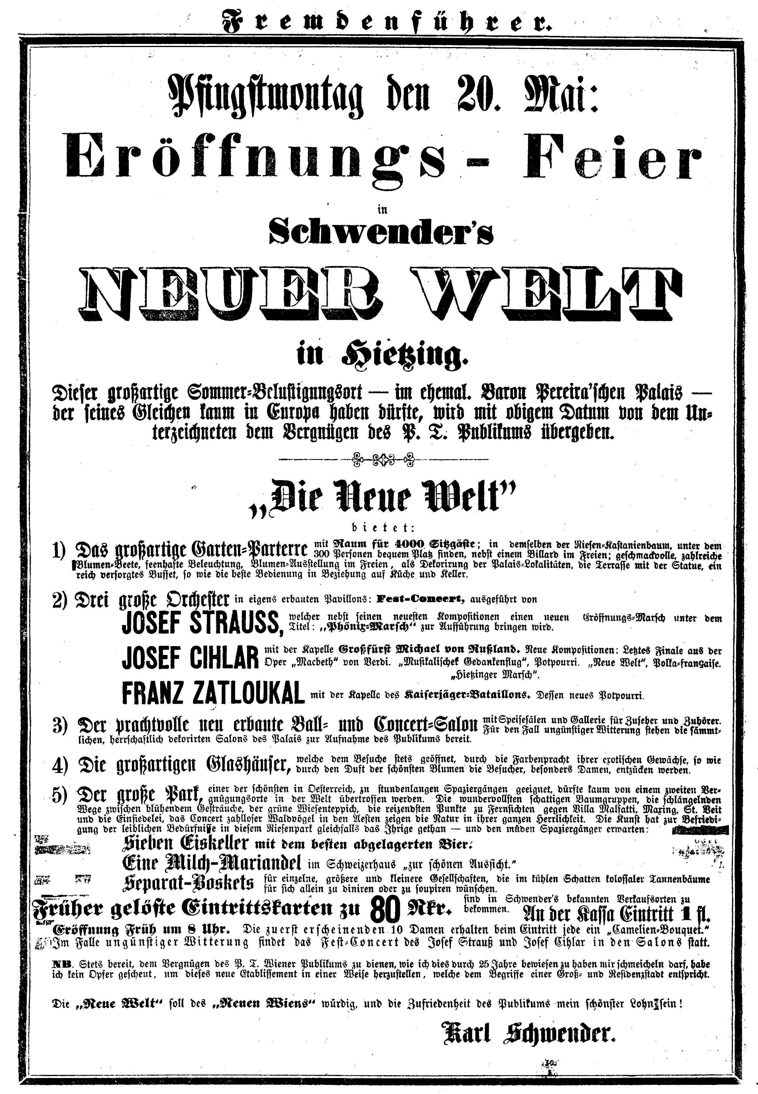 Wien, Hietzing, Anzeige der Eröffnung von Schwenders Neue Welt am 20. Mai 1861